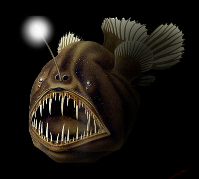 Image retravaillée pour les en-têtes des portail et projet Abysses